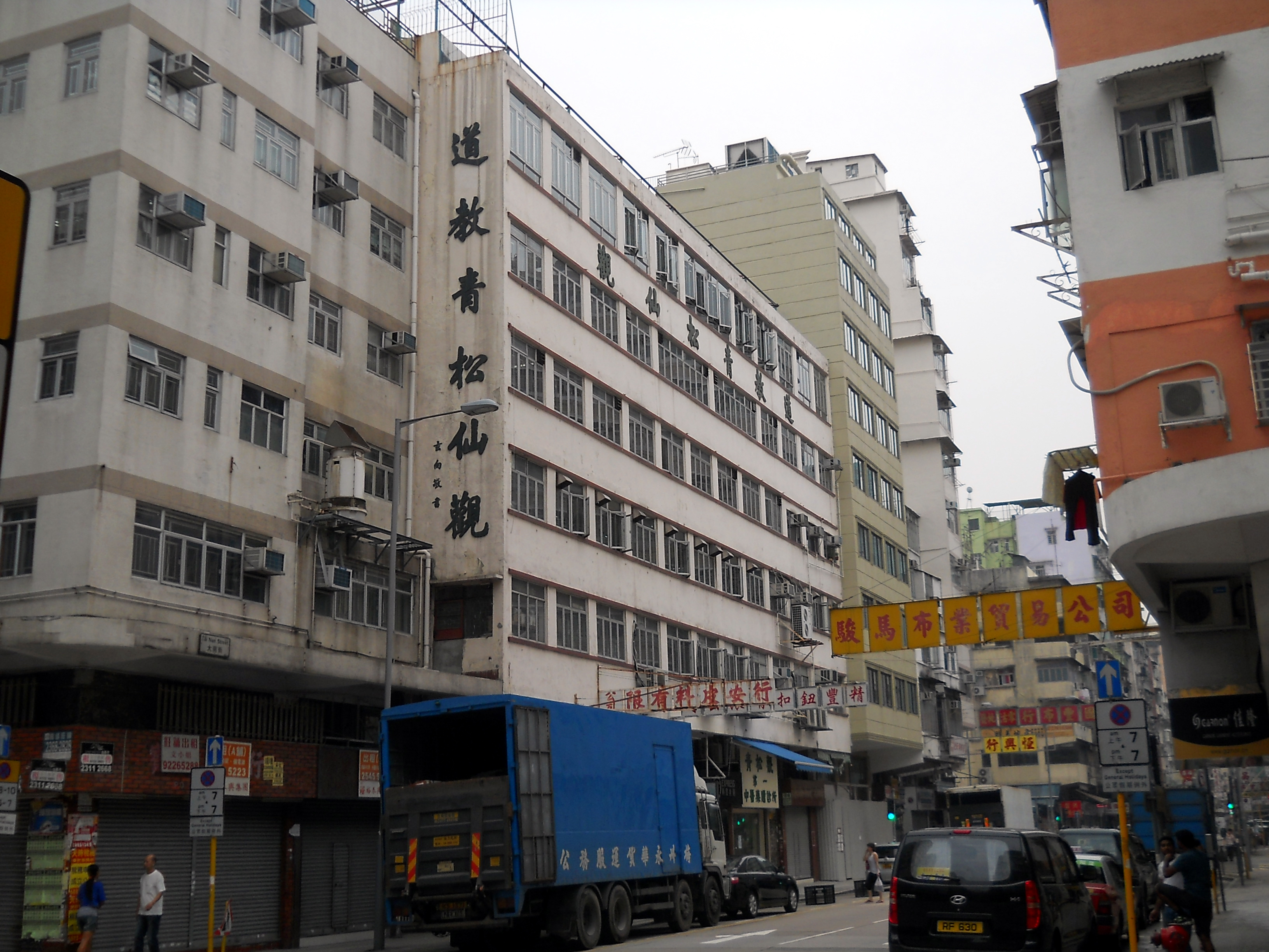 中文（香港）: 道教香港青松觀總辦事處